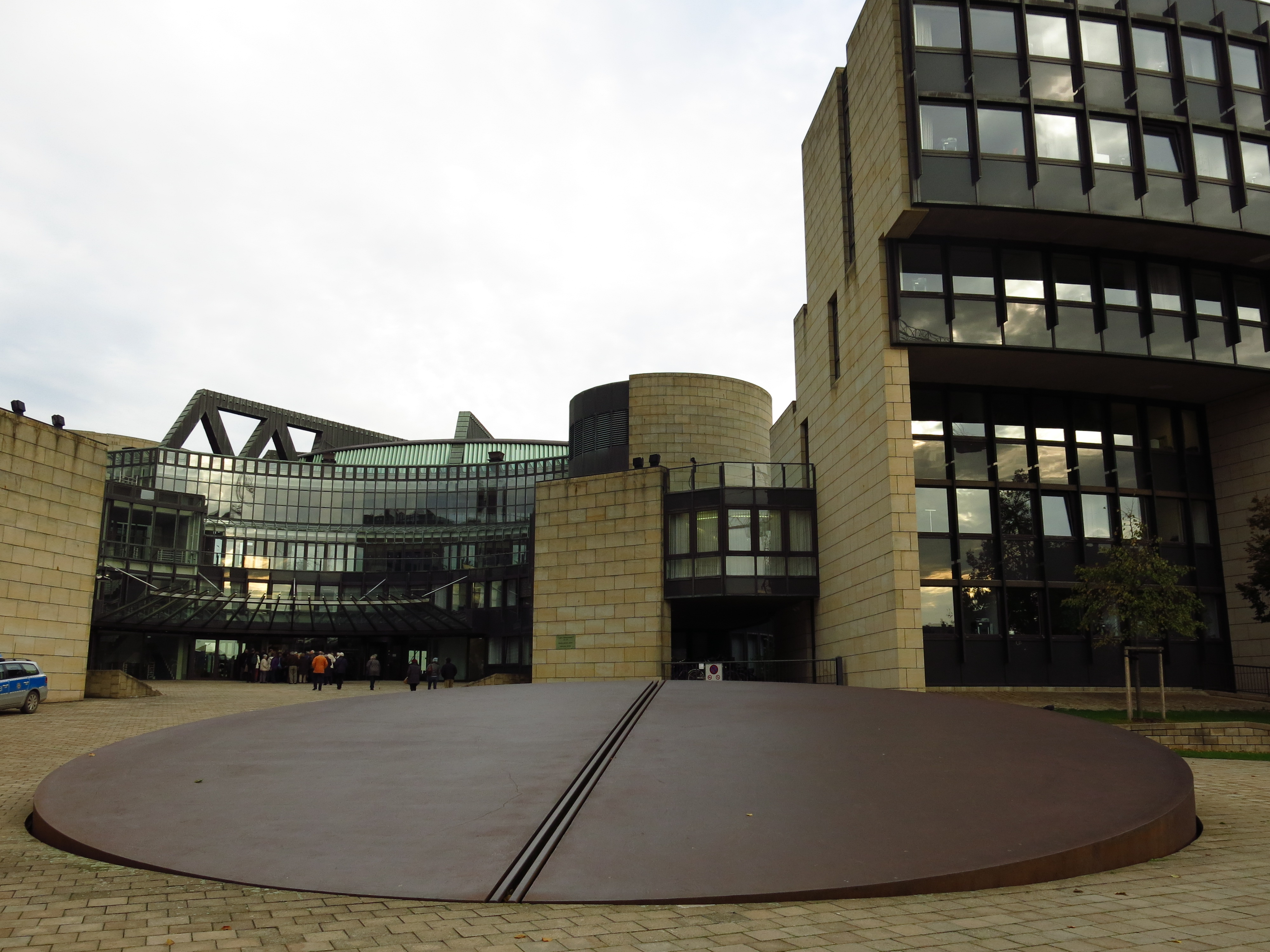 Außenbereich des Landtages Nordrhein-Westfalen